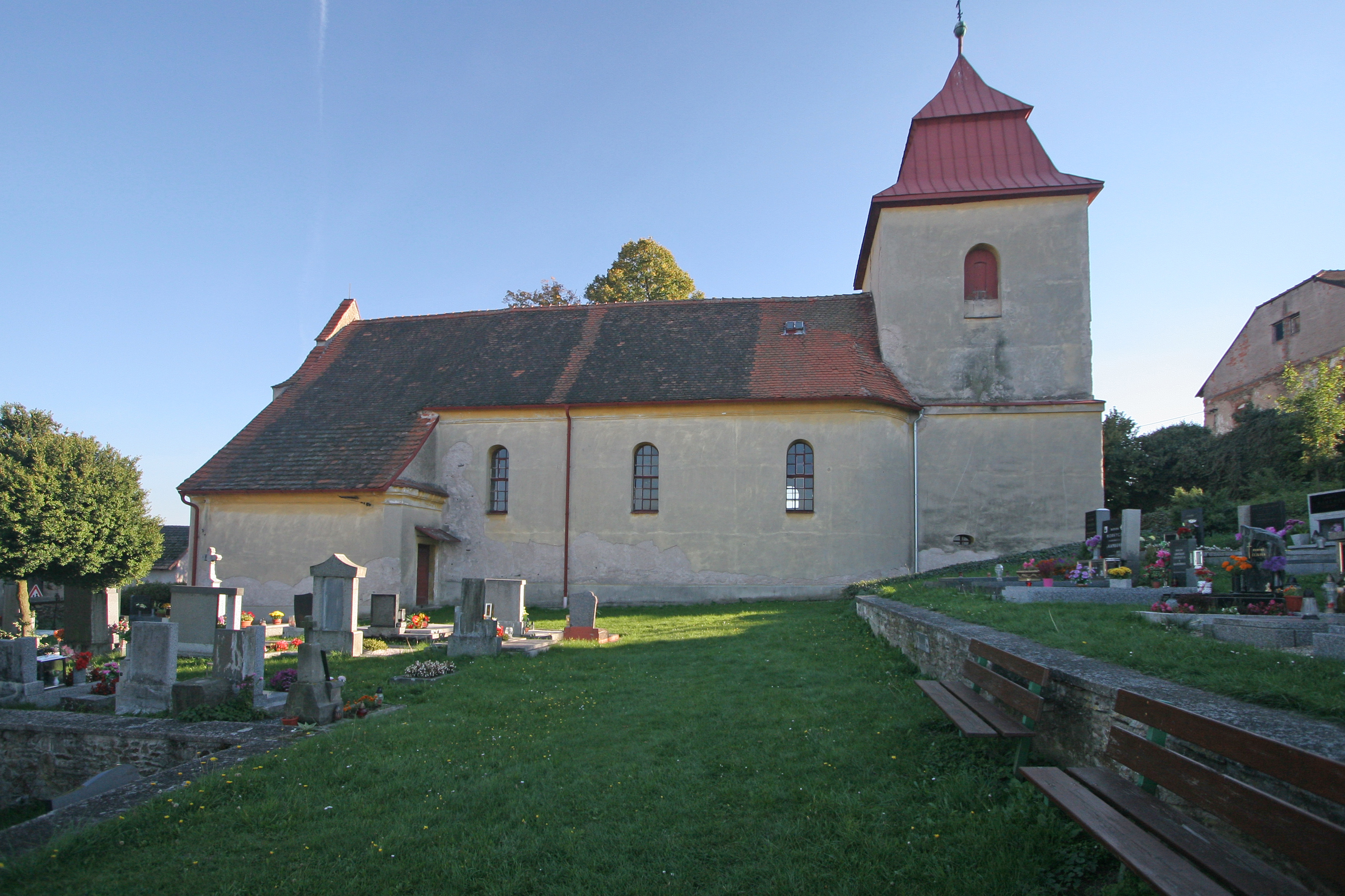 Kostel sv. Martina (Turkovice), Turkovice